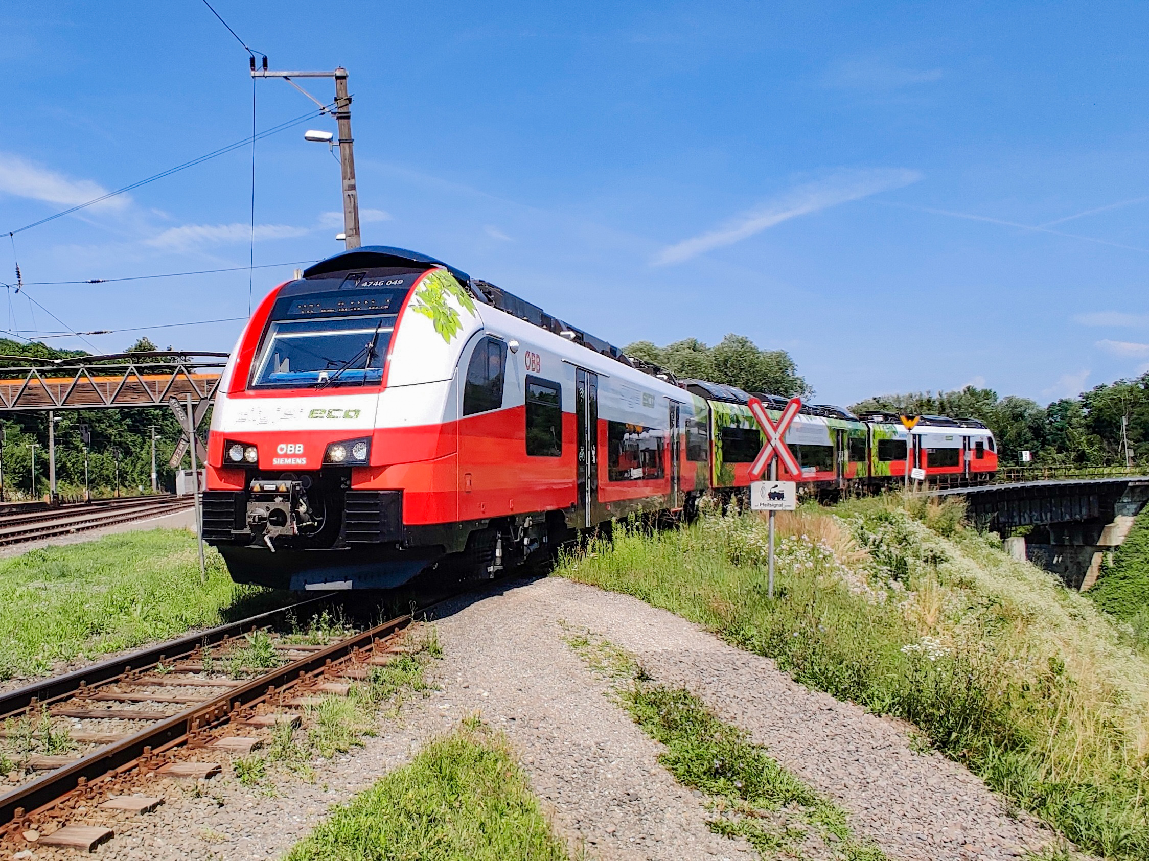 Akkutriebwagen ÖBB 4746 049 ("cityjet eco") bei der Einfahrt in den Bahnhof Spielfeld-Straß nach einer Testfahrt auf der Radkersburger Bahn